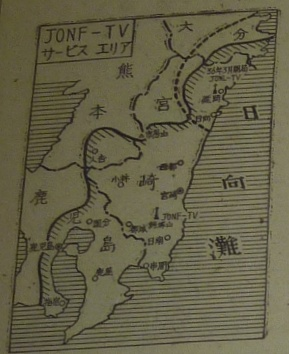 ラジオ宮崎テレビ（MRT宮崎放送）アナログテレビ放送開始当時のサービスエリア。